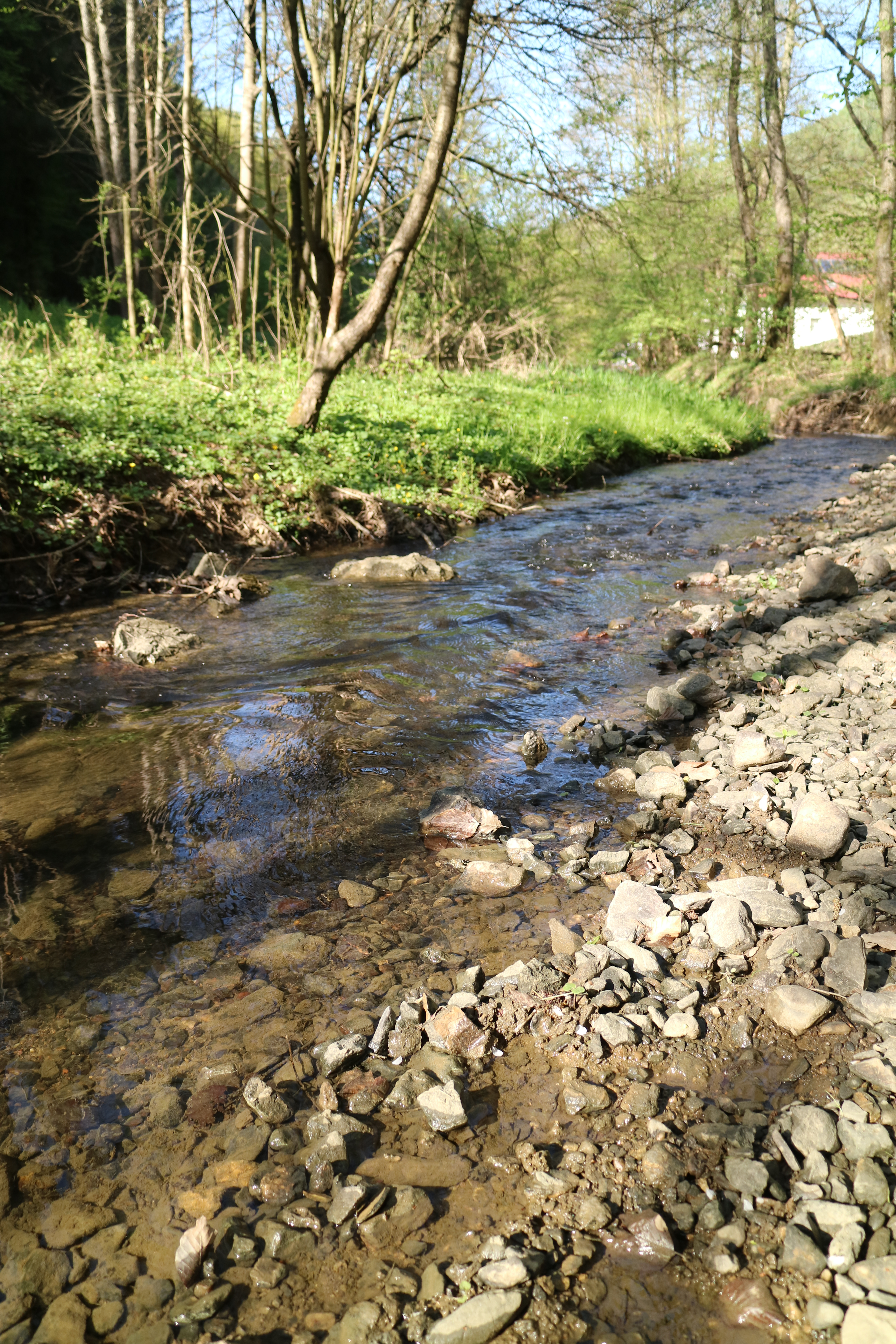 Thaler Bach im Göstinger (Thaler) Graben, Graz-Gösting